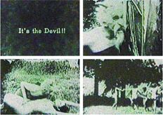 Cuatro fotogramas del film El Sartorio, quizás el primer film pronográfico de la historia.